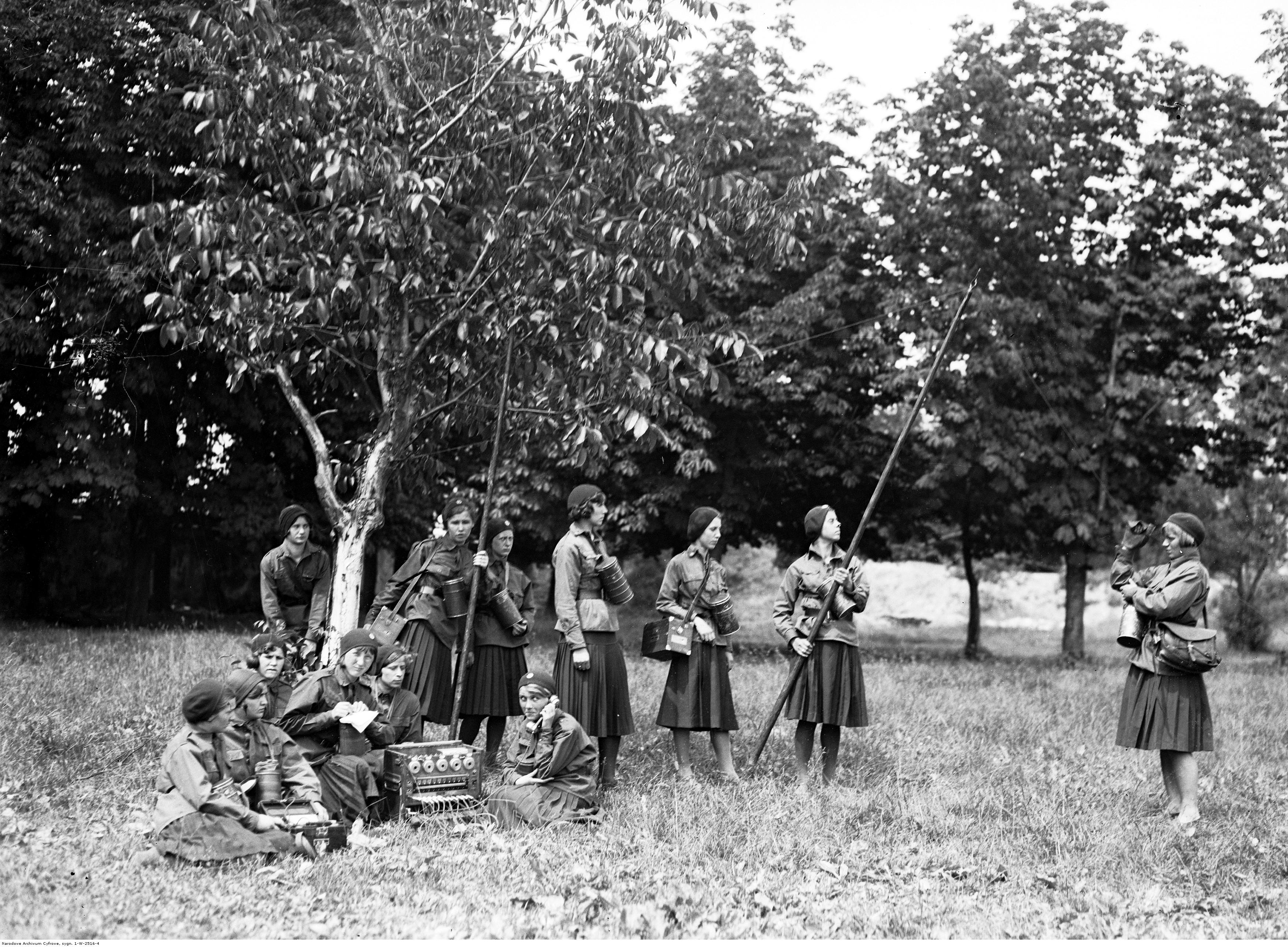 Członkinie Przysposobienia Wojskowego Kobiet podczas ćwiczeń z łącznicą polową ŁP-10 wz. 28.